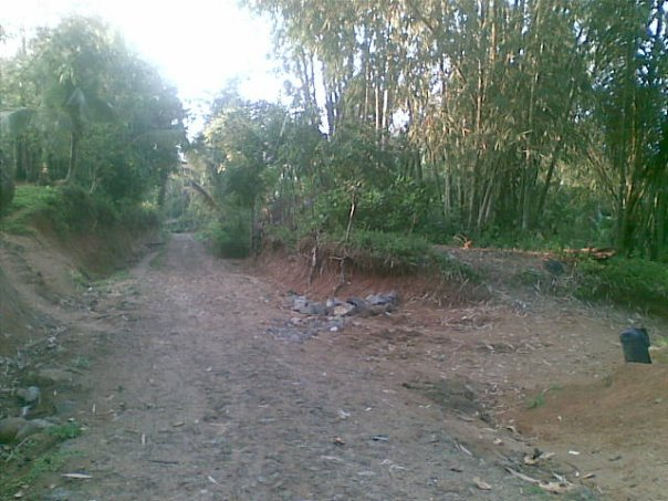 Jalan Pasirhuni Desa Cikadu